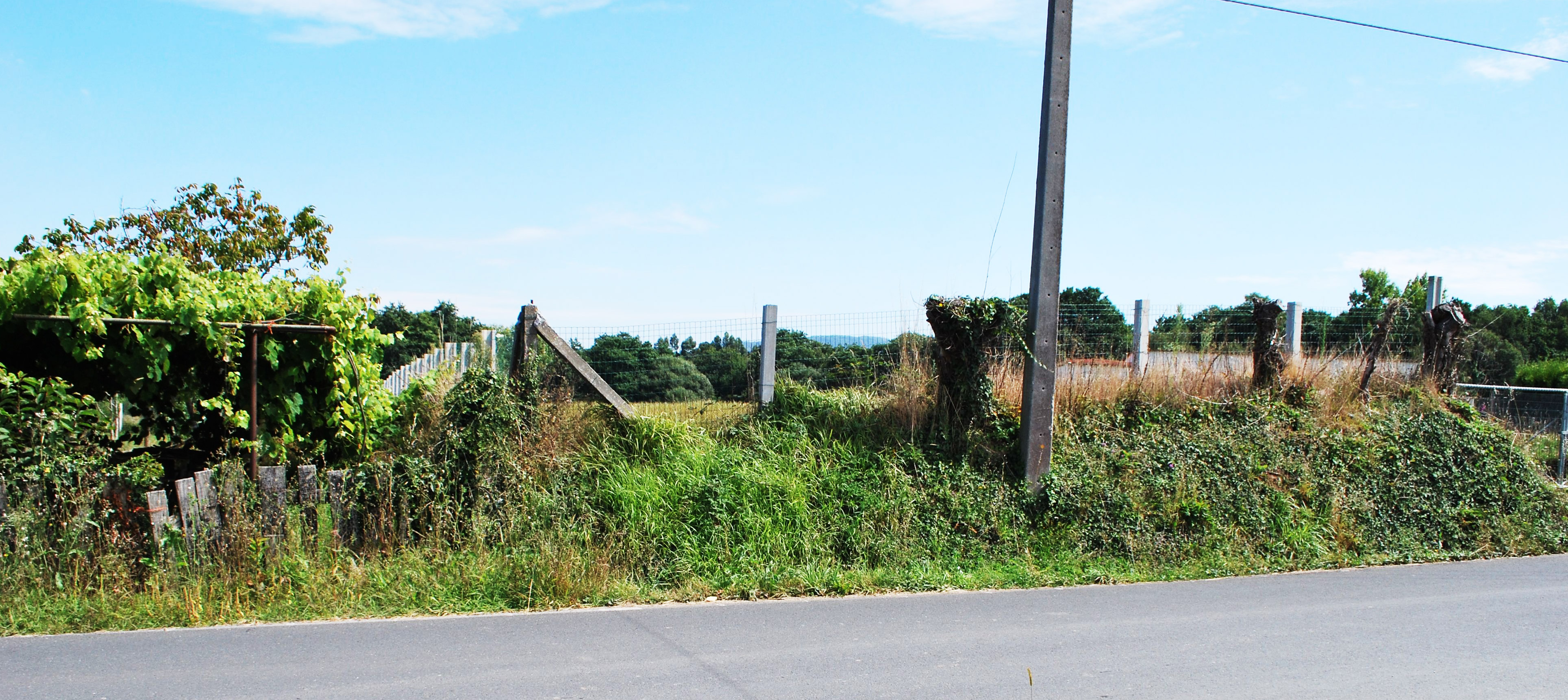 Vista do que queda dun dos muros do castro empregado coma linde entre fincas (entre a estrada e o rego)